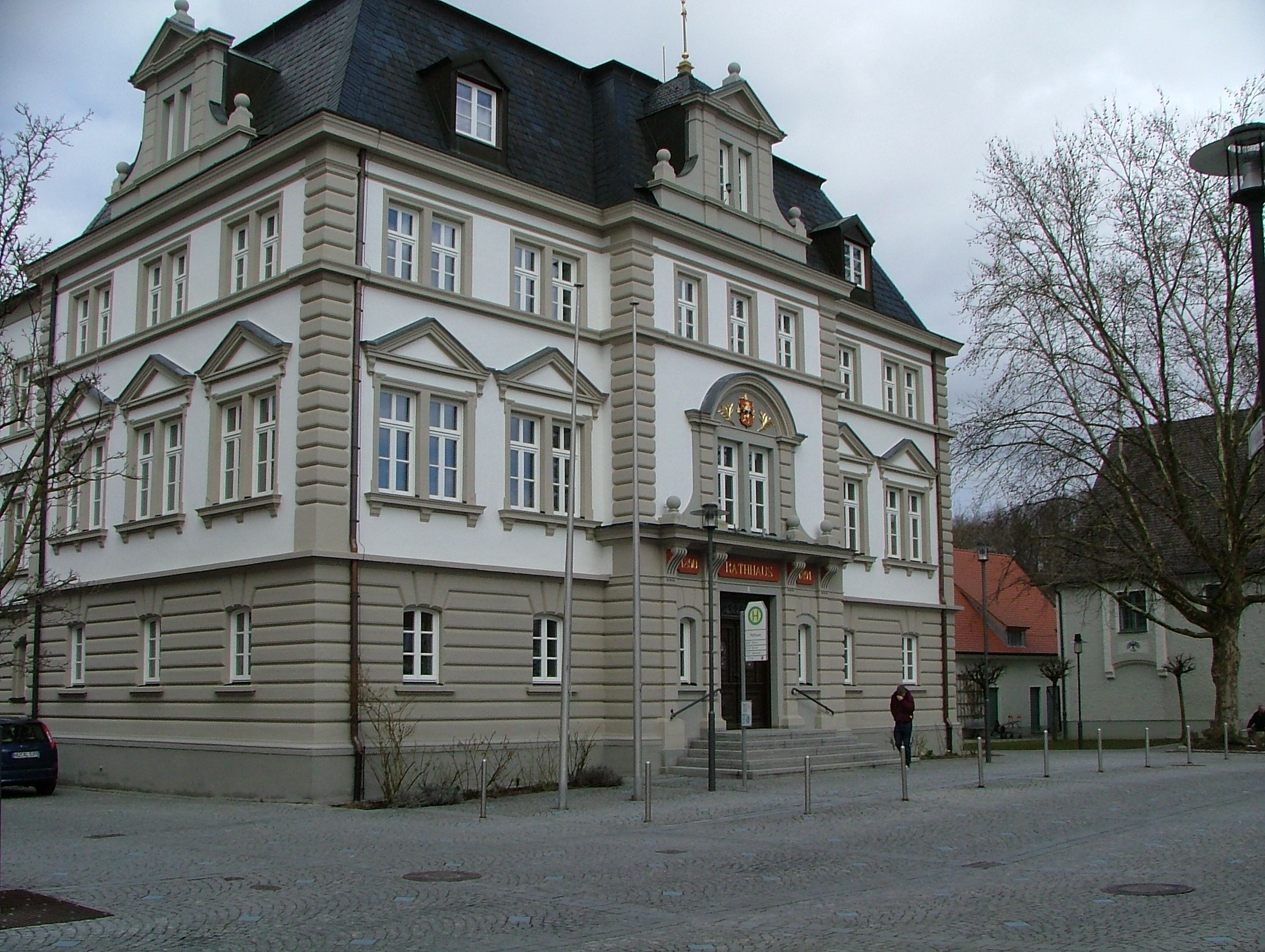 Rathaus im Schlosssstil